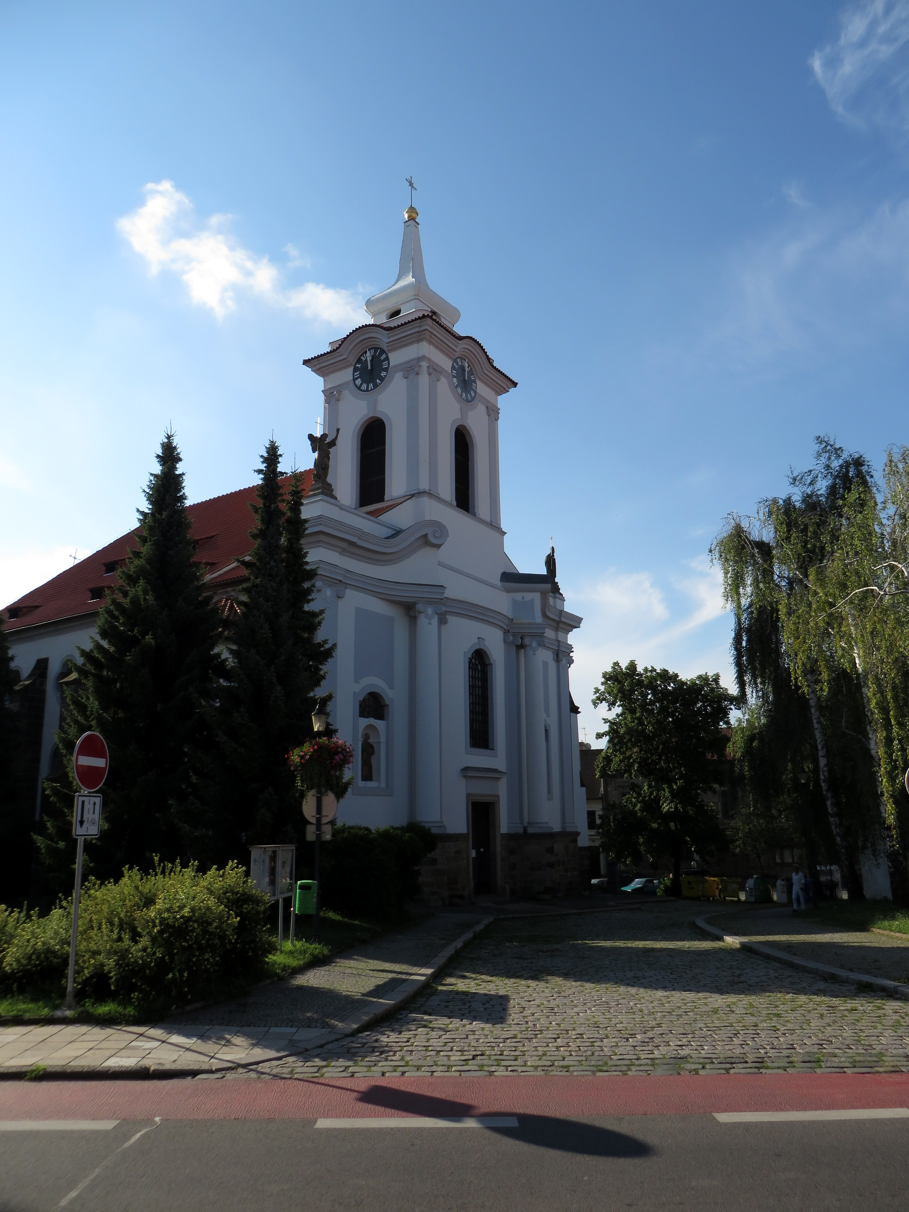 Kostel sv. Gottharda, nám. Arnošta z Pardubic, Český Brod, Český Brod.